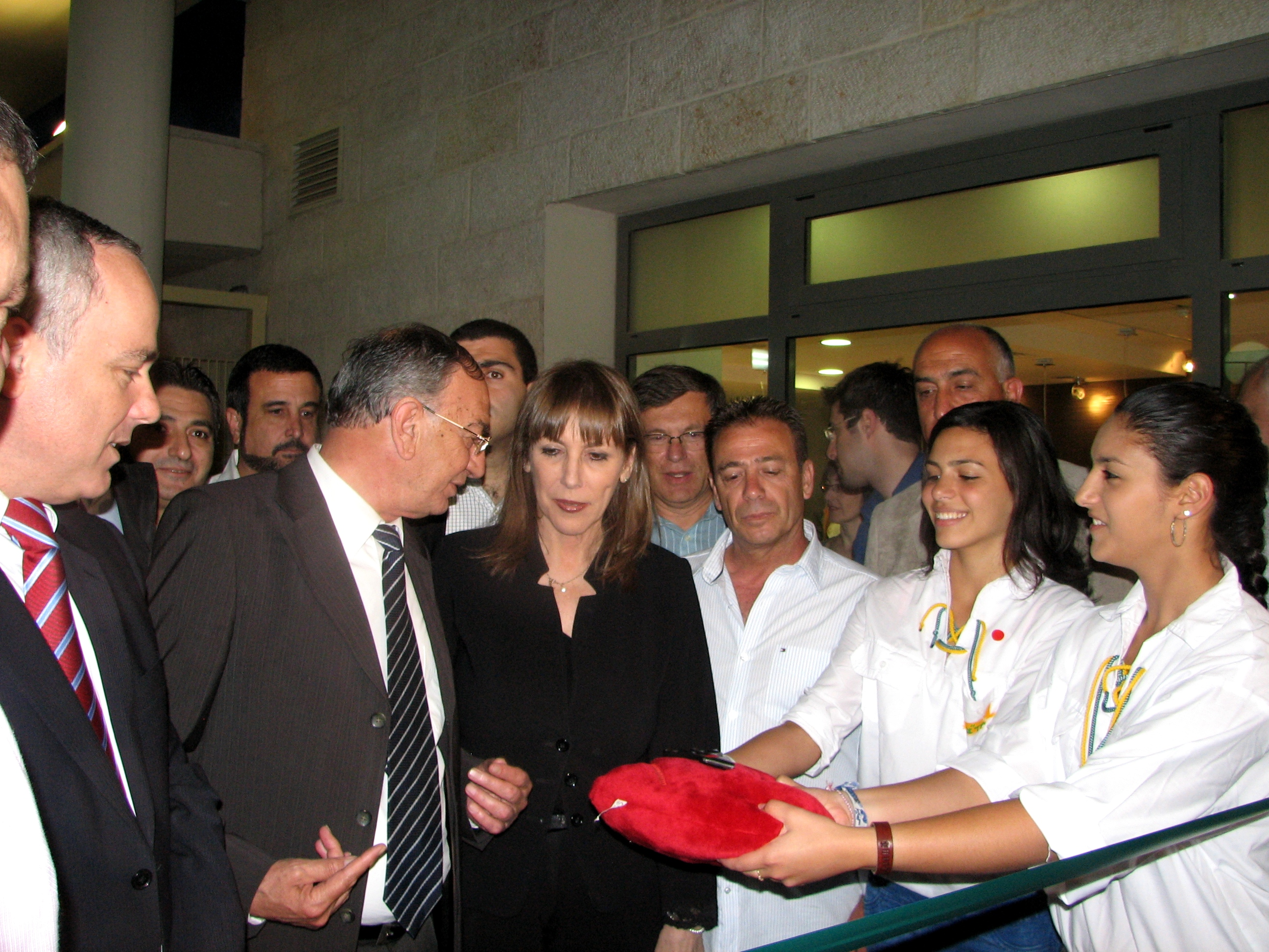 Country club opening in Nesher 29.4.2010 with the ministers Limor Livnat & Yuval Steinitz טקס פתיחת הקאנטרי קלאב בעיר נשר ביום 29.4.2010 בנוכחות השרים לימור לבנת שרת התרבות והספורט ויובל שטייניץ שר האוצר לימור לבנת בטקס גזירת הסרט משמאלה ראש עיריית נשר דוד עמר ויובל שטייניץ